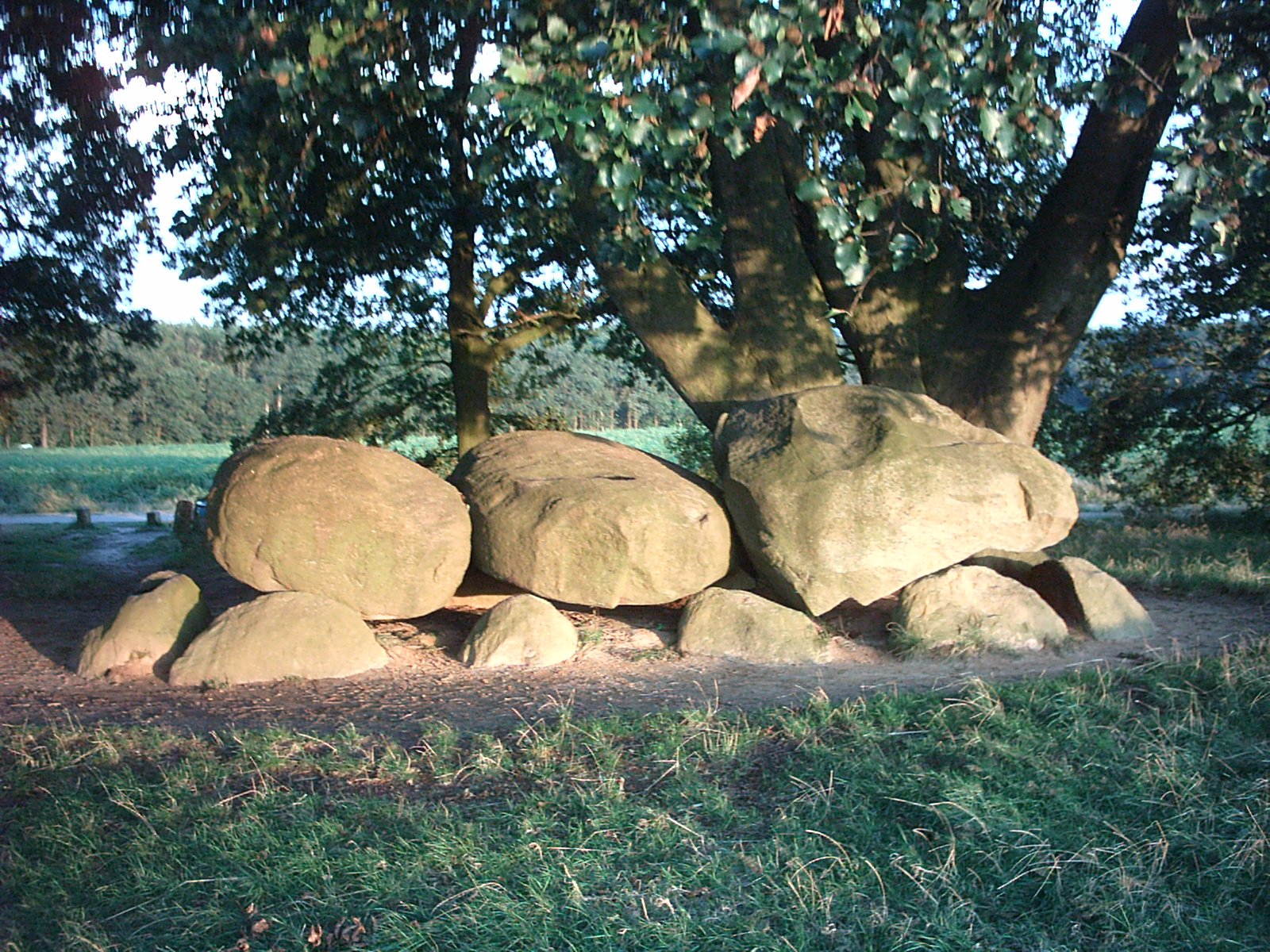 Hunebed D21 near Bronneger, August 2004.